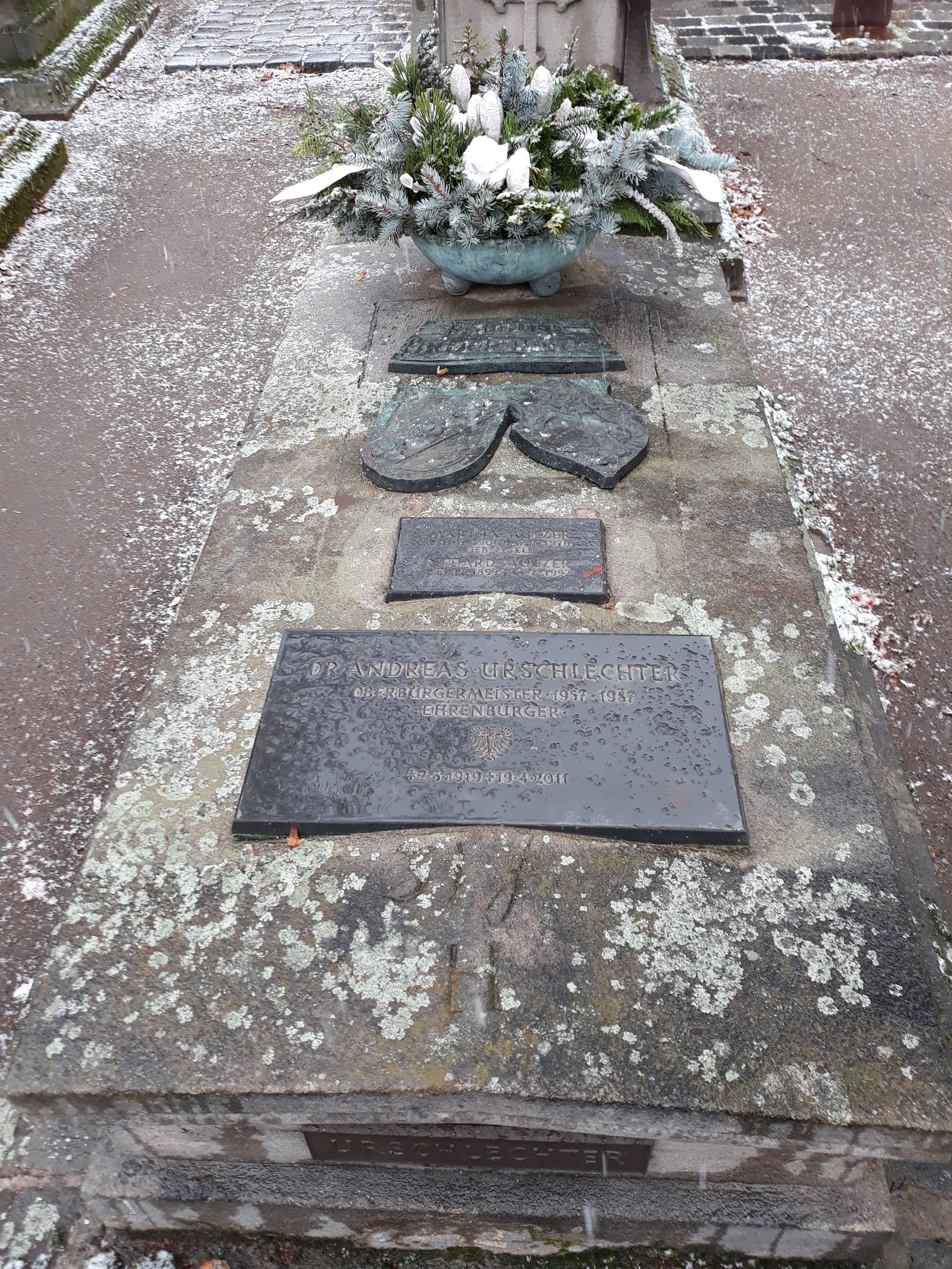 Das Grab des deutschen Politikers Andreas Urschlechter auf dem Johannisfriedhof Nürnberg.